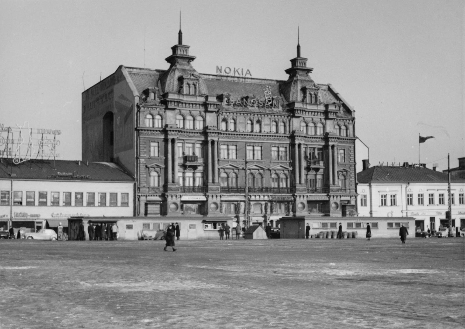 Lindblomin talo